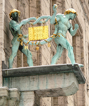 Bahlsen Keksfabrik Hannover, Schmuckfiguren an der Fassade